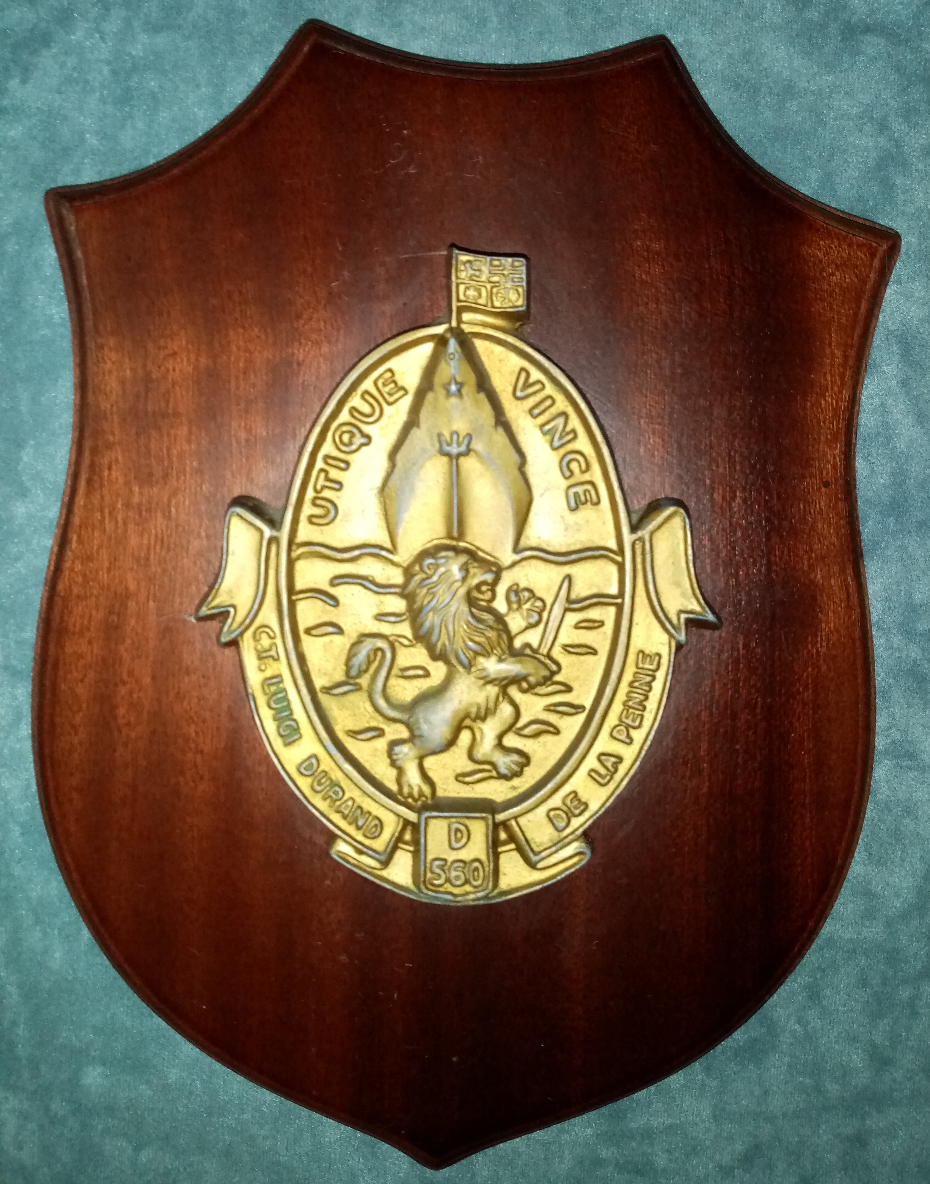 Crest di Nave Luigi Durand De La Penne (D560) della Marina Militare Italiana